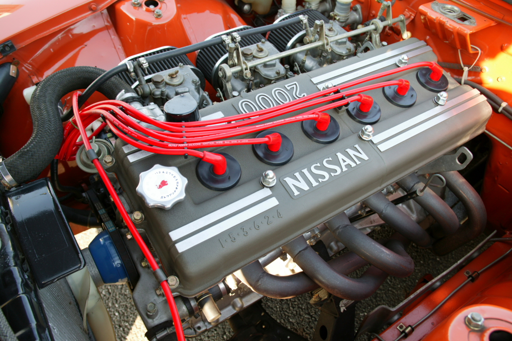 Nissan S20 engine on Datsun Fairlady Z 432 ( PS30 )